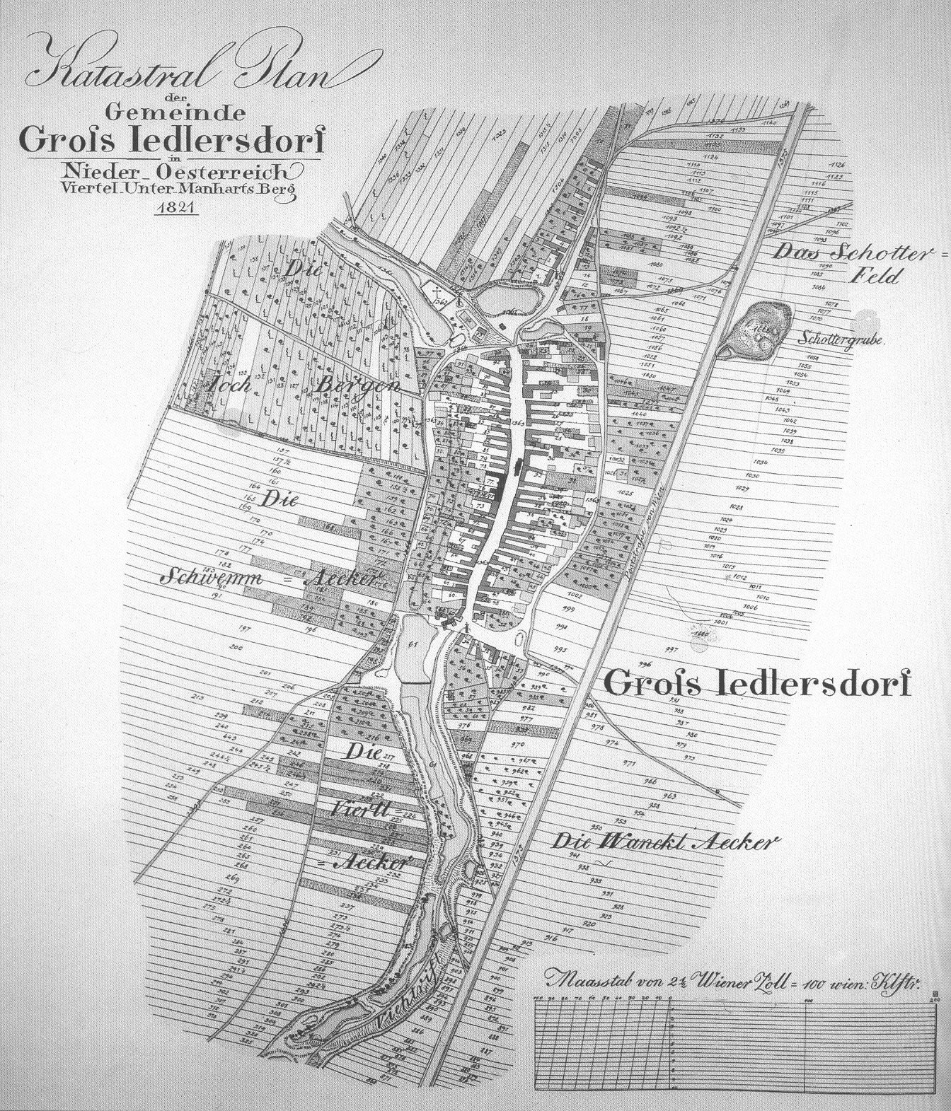 Map of Groß-Jedlersdorf (Wien)